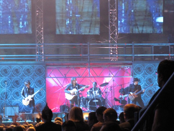 Группа Река на премии Чартова Дюжина в Олимпийском 5 марта 2011 года